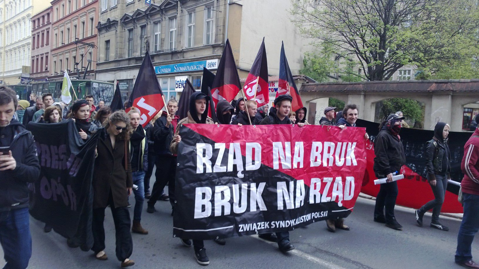 Związek Syndykalistów Polski na demonstracji we Wrocławiu z okazji Święta Pracy, 1 maja 2013.